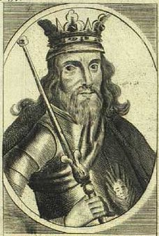 Valdemar 1. den Store (1131-1182). Det Kongelige Bibliotek.